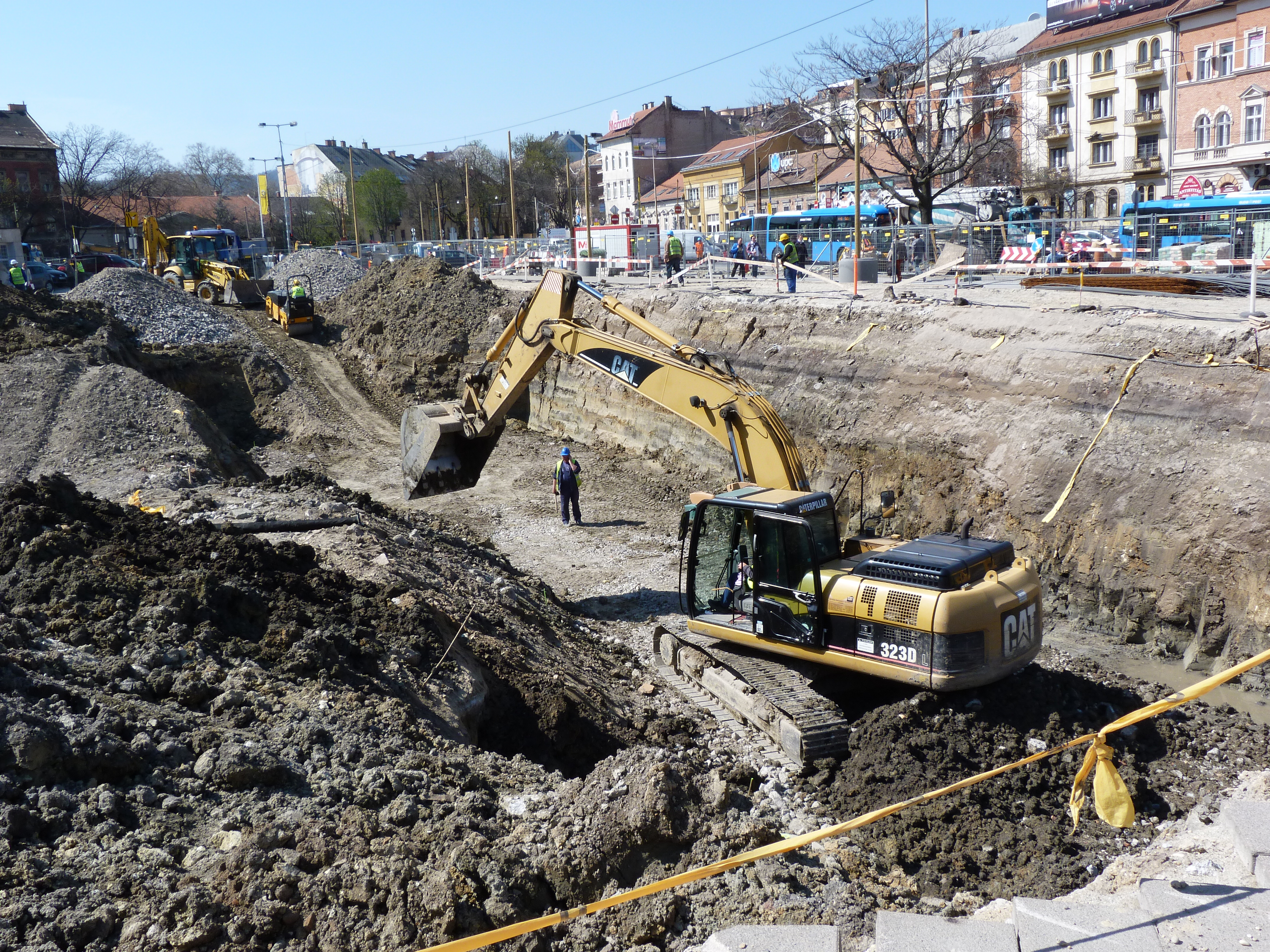 A felvétel 2015. április 10-én készült Budapesten, a Széll Kálmán téren. ©© Derzsi Elekes Andor, Budapest, 2015, A fénykép másolását és felhasználását a szerző ellenérték nélkül megengedi. Az engedély kiterjed a kereskedelmi célú hasznosításra is. Kéri azonban nevének feltüntetését a felhasználás során. A Metapolisz sorozat valamennyi képe és filmje Creative Commons alatti. kereskedelmi - for profit - célra is felhasználható. Ajánlott hivatkozás: Derzsi Elekes Andor: Metapolisz DVD line